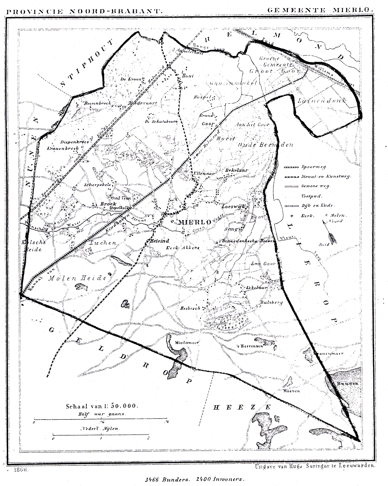 Nederland, Noord-Brabant, Gemeente Mierlo